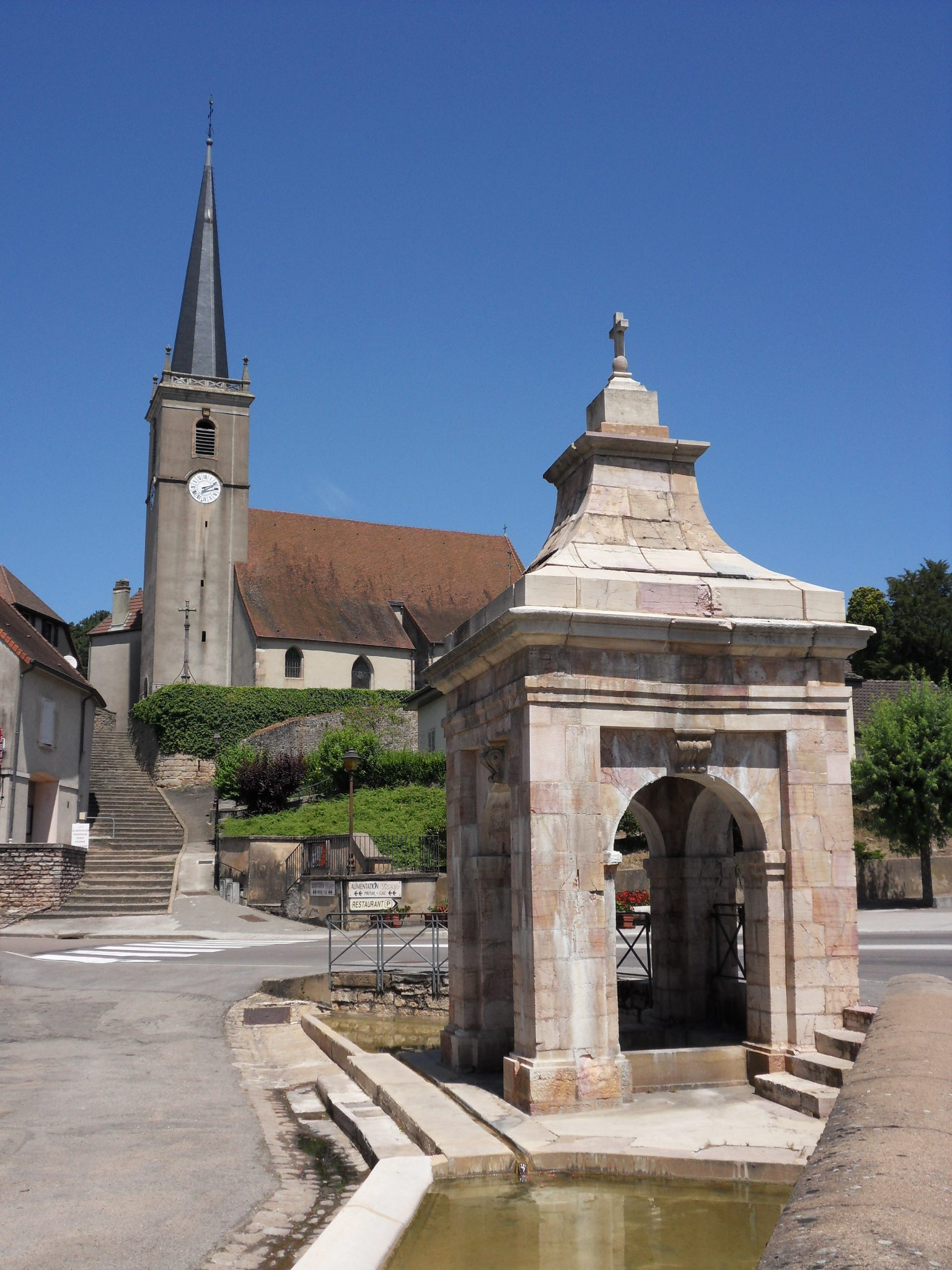 Moissey Moissey Département du Jura, Franche-Comté, FRANCE